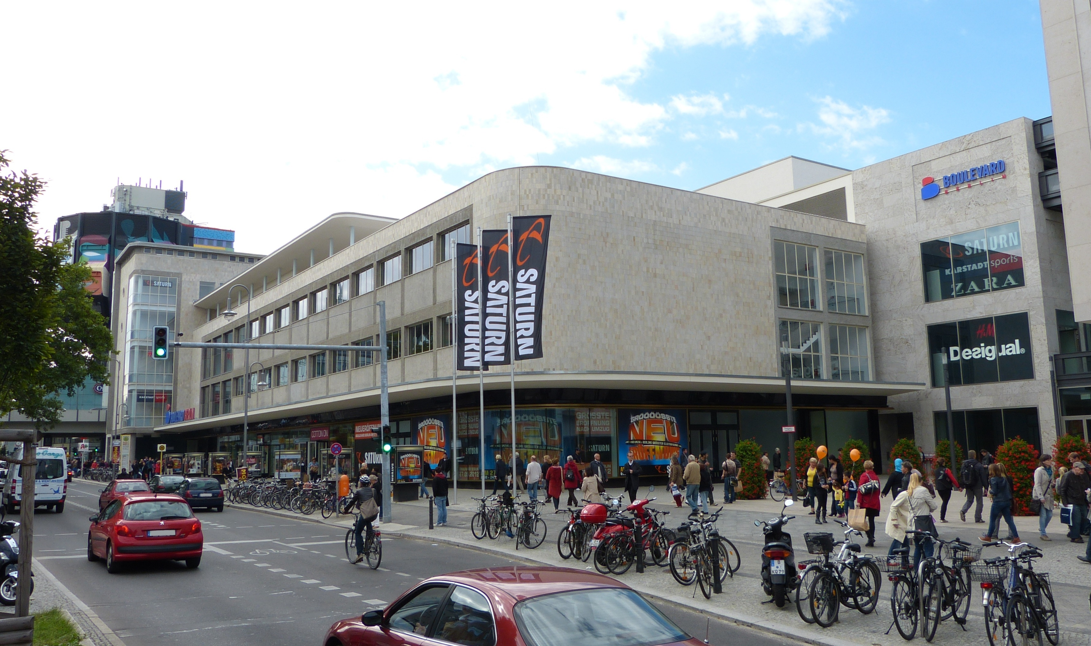 Boulevard Berlin, Schloßstraße 11-15